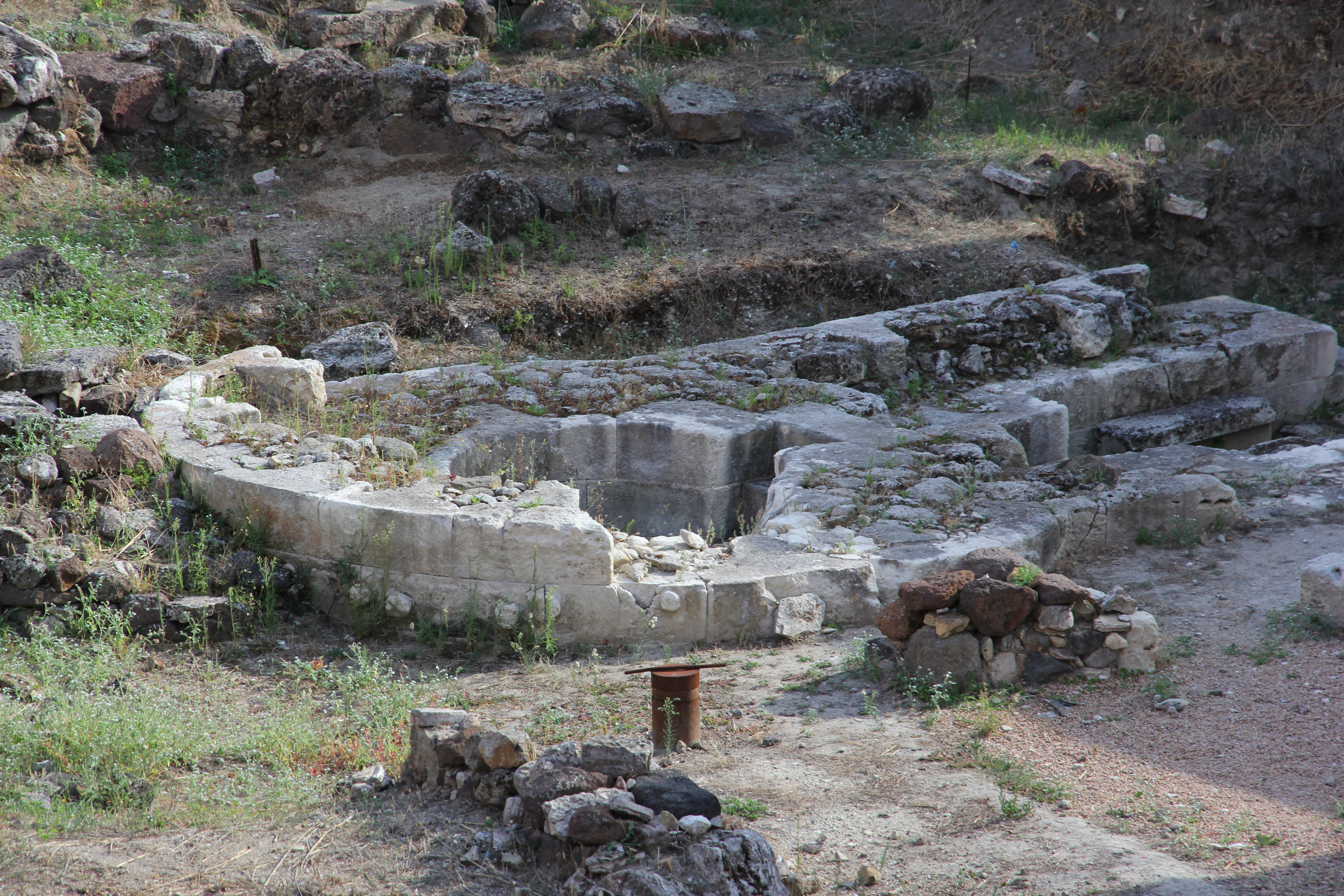 Perfugas - Pozzo sacro di Predio Canopoli